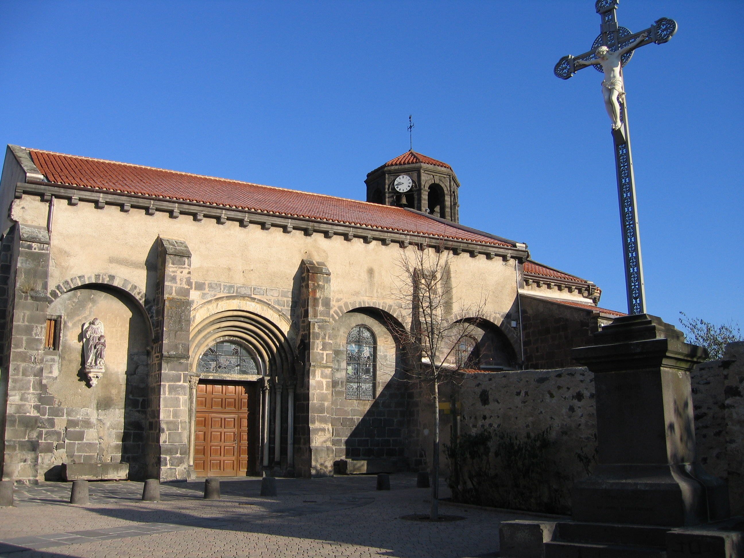 Église de Marsat, Puy-de-Dôme (auteur : Jean-Marc Aubelle)